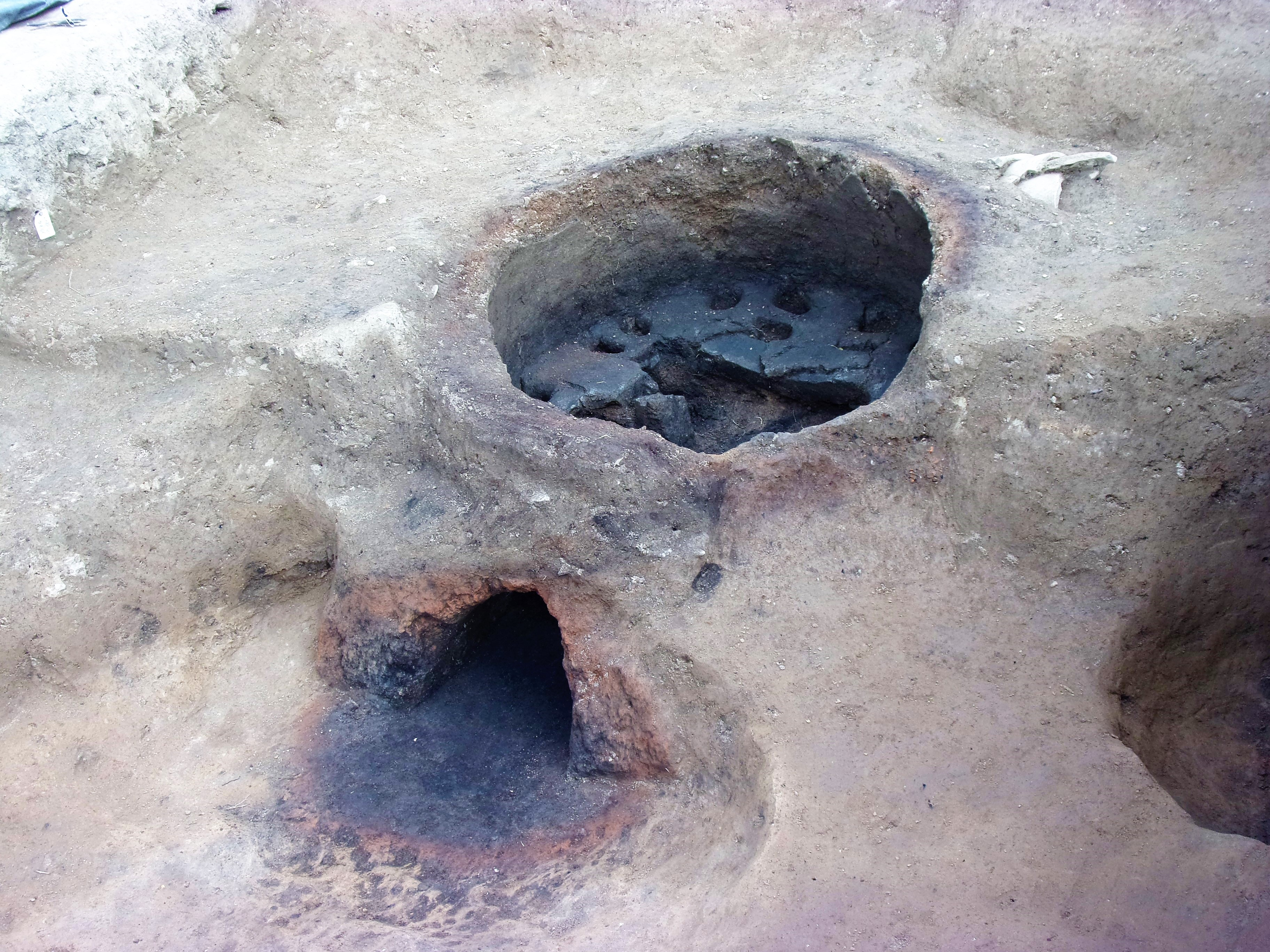 Four de potiers gaulois. Site des Châteliers